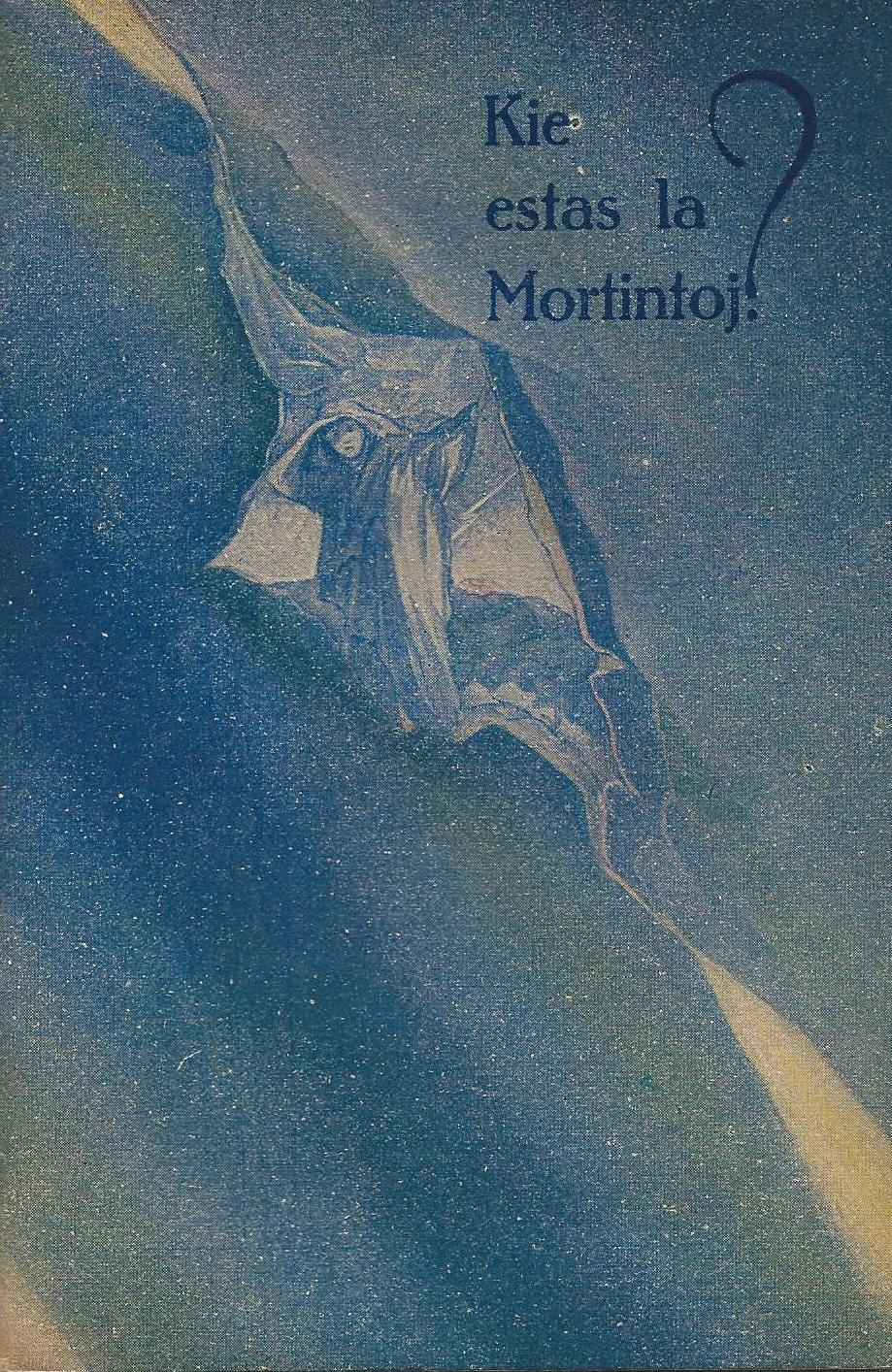 librokovrilo de "Kie Estas la Mortintoj", 1927